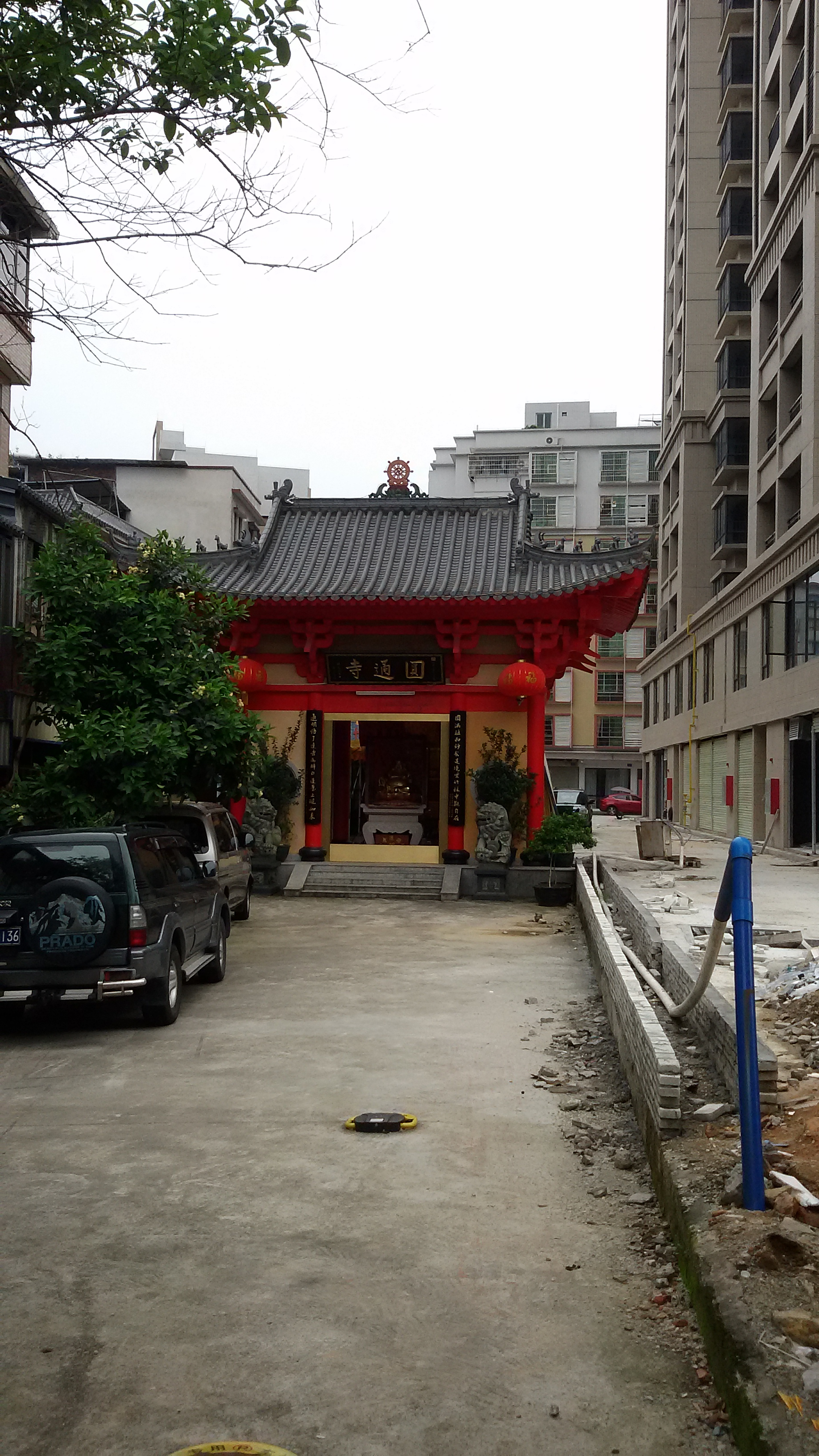 粵語: 廣州市從化區嘅圓通寺